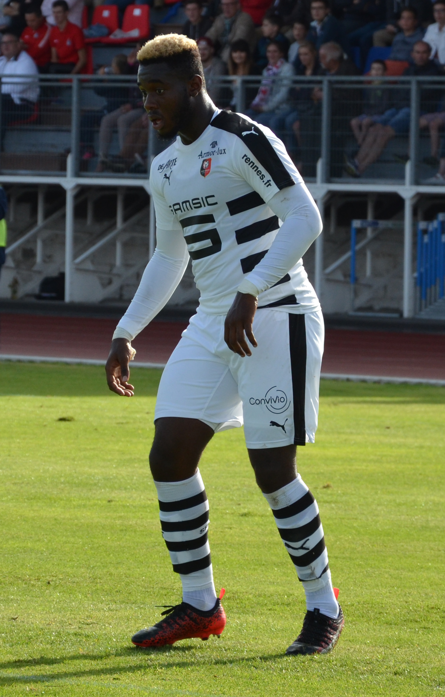 Photographie prise lors du match opposant le Stade rennais au SM Caen en match amical au stade Pierre-Compte de Vire le 22 juillet 2017. Ici, Joris Gnagnon.